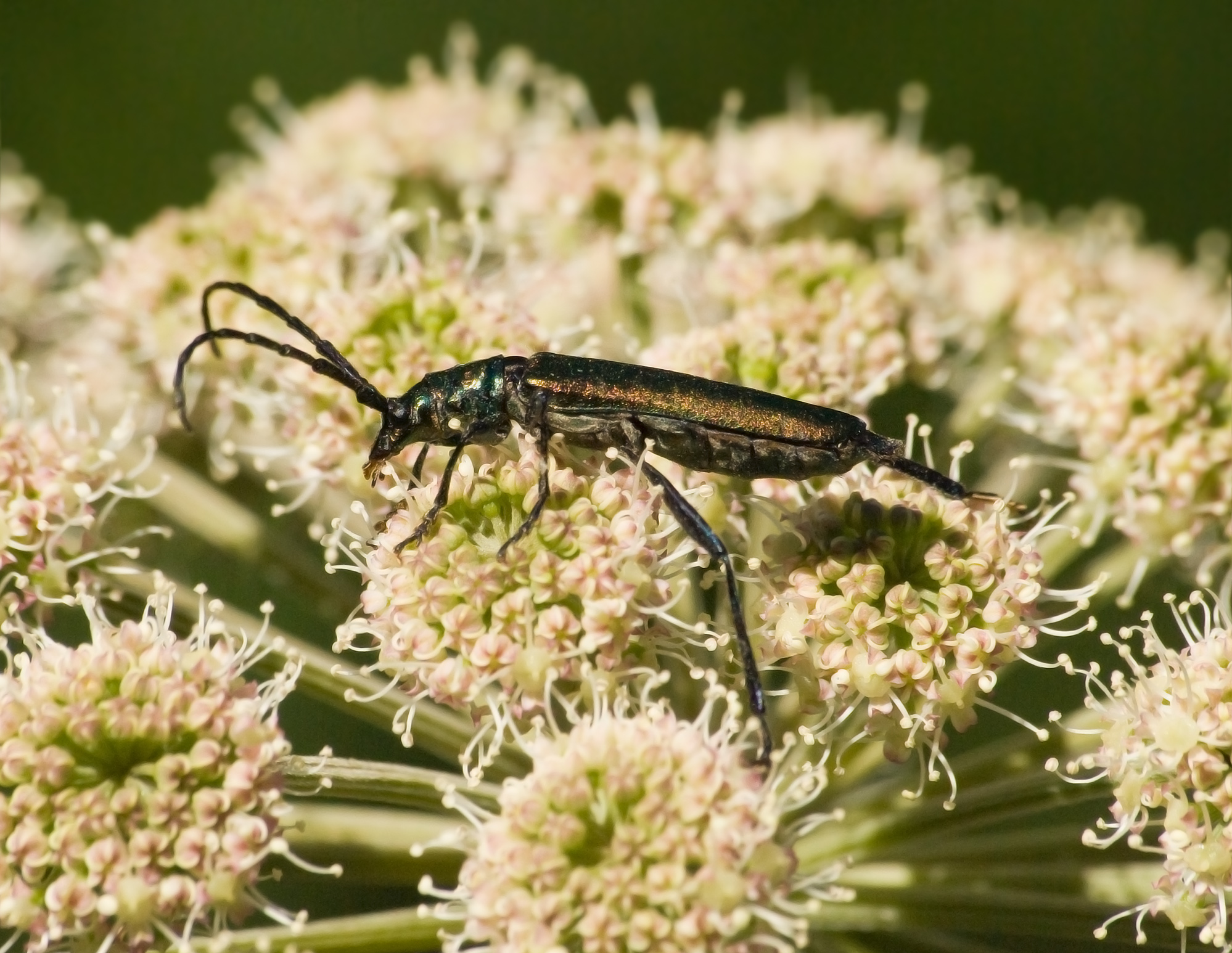 Cerambycidae